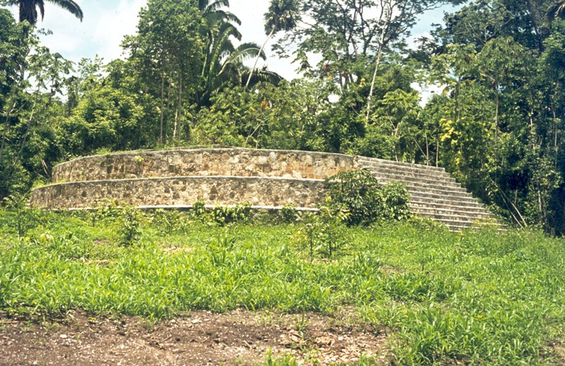 Observatorio de Ceibal, 2000